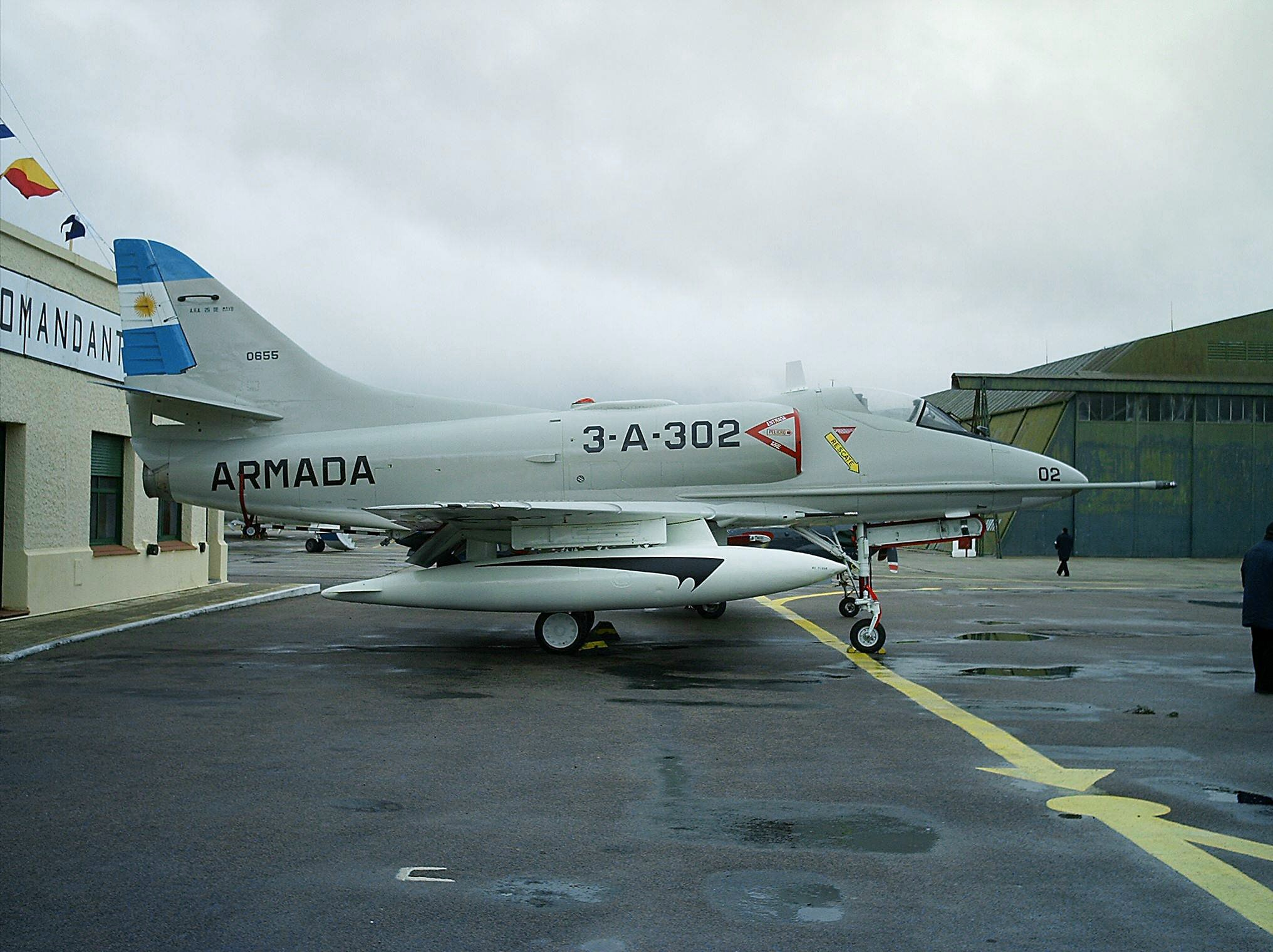 Presentacion del Avion 3-A-302 restaurado por el Museo de la Aviacion Naval Argentina.